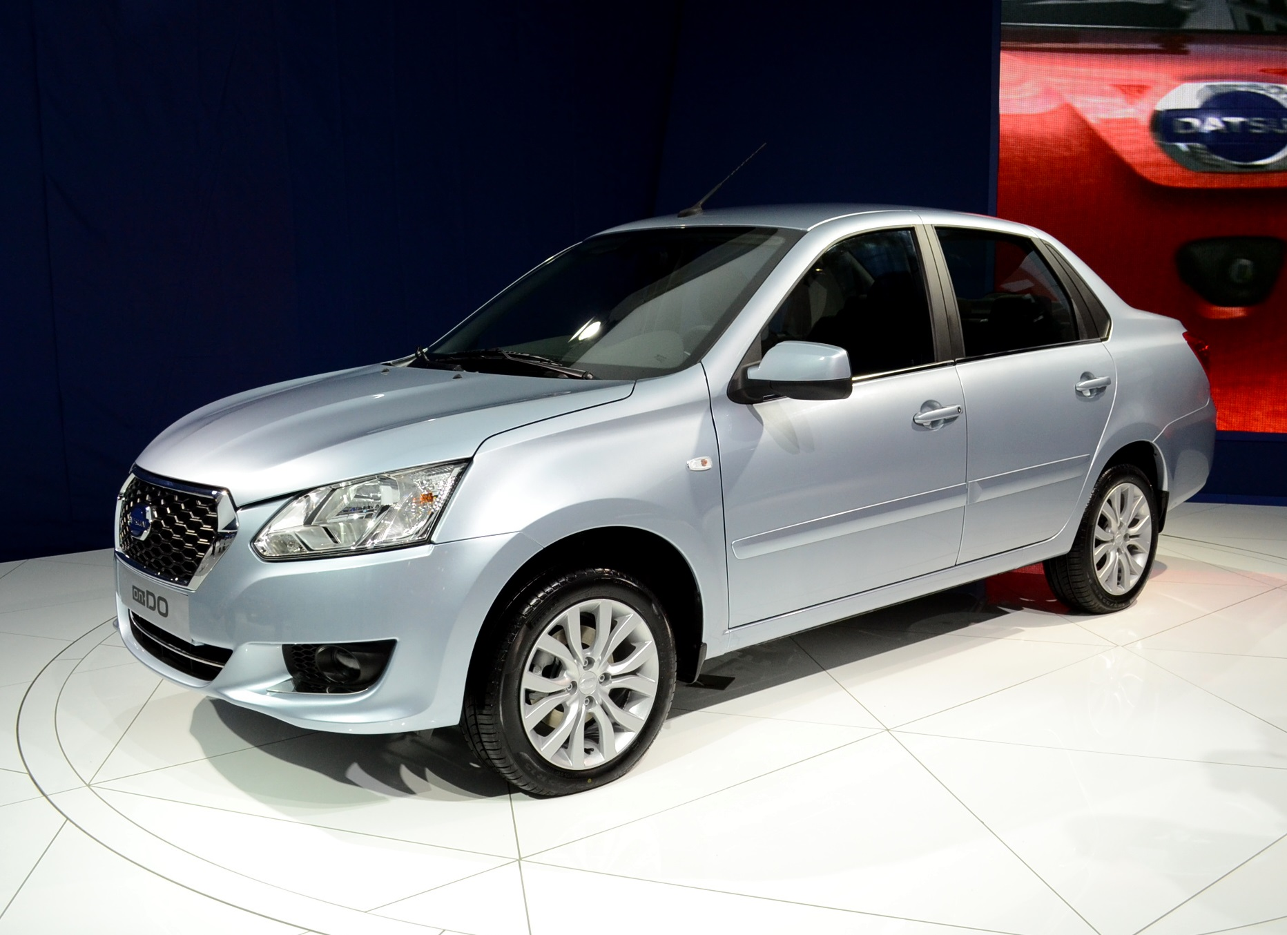 Седан Datsun on-DO на Московском автосалоне-2014